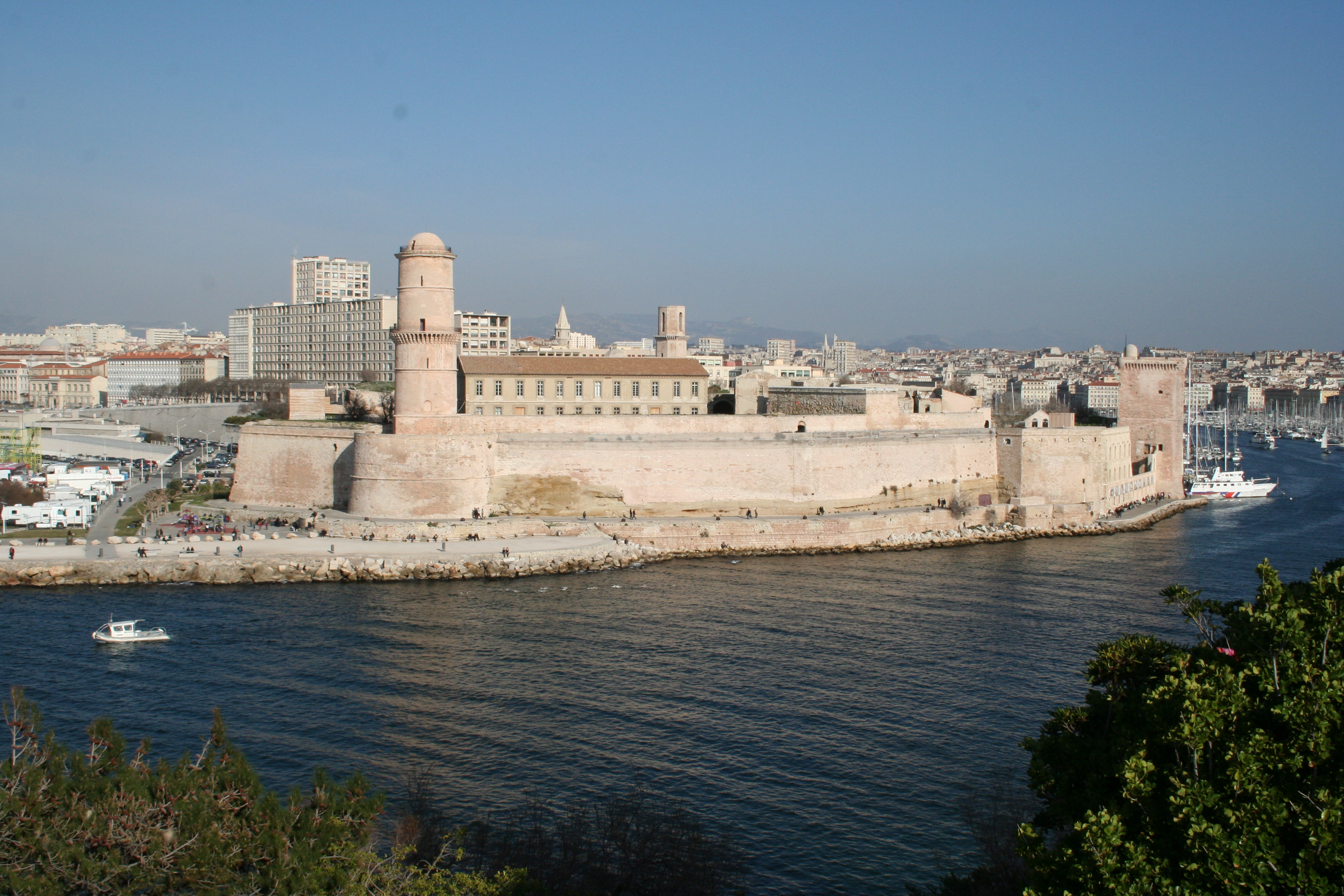 Fort Saint-Jean à Marseille, photo prise à partir du jardin du pharo.